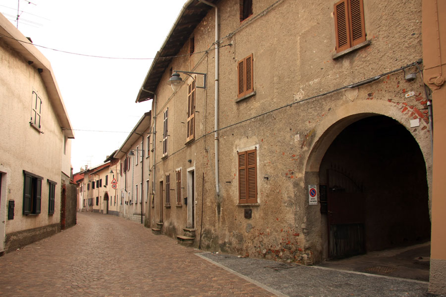 Scorcio di una via del centro (Via Santa Caterina) a Borgo Ticino